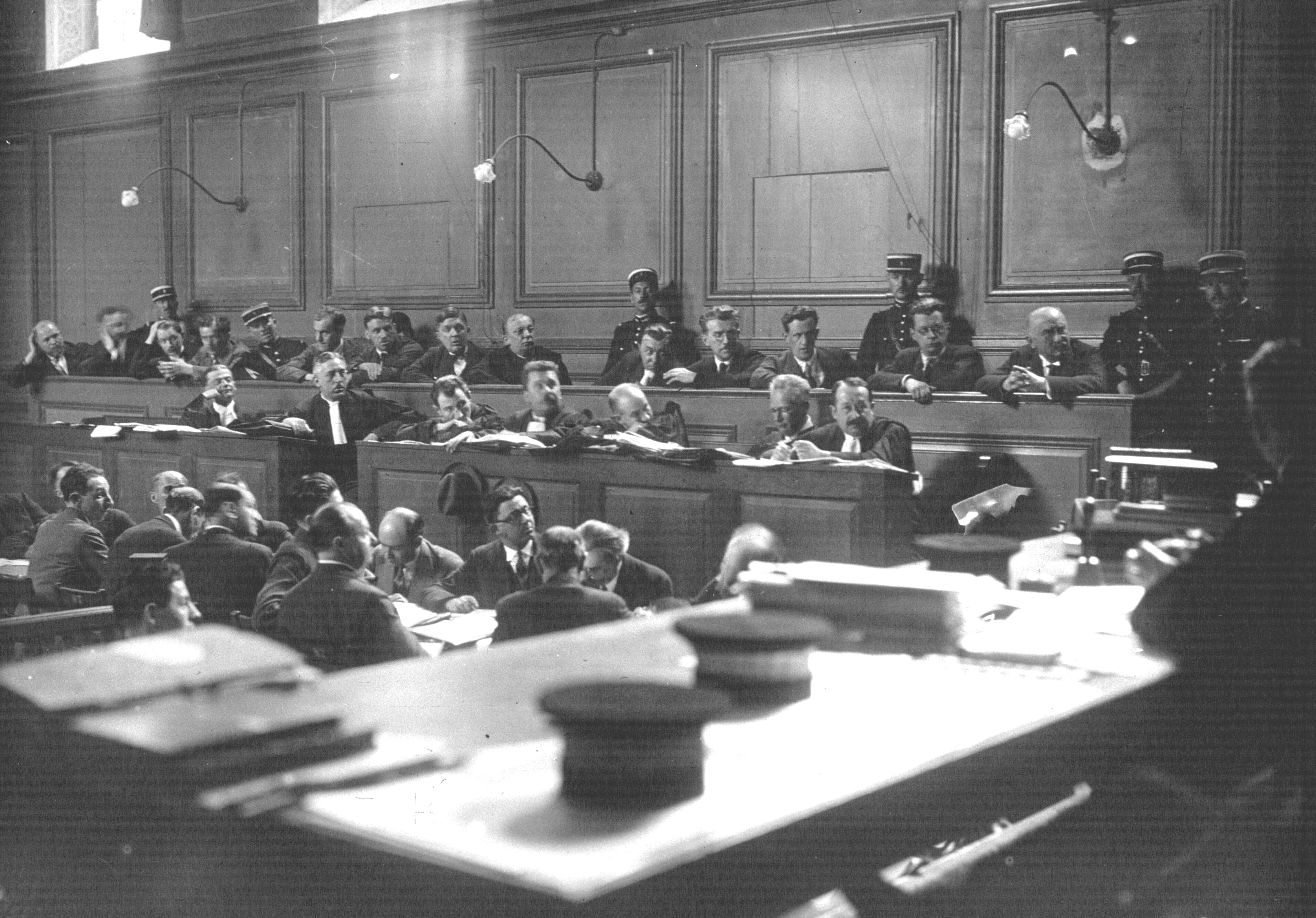 Colmar : procès des autonomistes : de gauche à droite, Ricklin, député ; Schall ; Hauss ; Wurtz ; Solvein [?] ; Fashauer, Schlaegel ; Rossé, député ; Schweitzer ; [illisible] Tashauer-Eygmann ; Heil ; Sturmel ; Baumann ; Kohler ; Reisacher